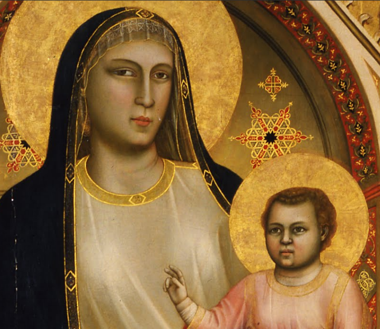 Madonna Enthroned